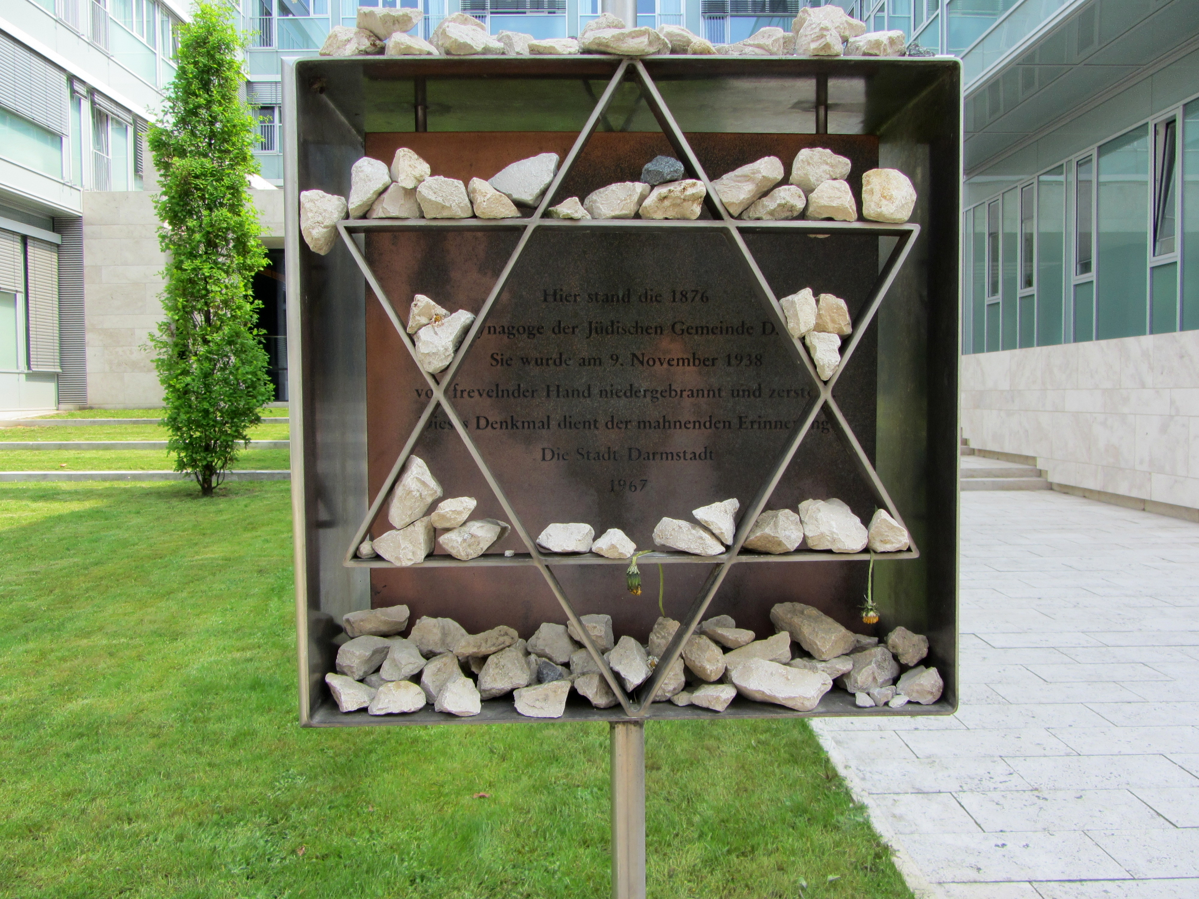 Gedenktafel auf dem Julius-Landsberger-Platz, an der Erinnerungsstätte Liberale Synagoge Darmstadt.